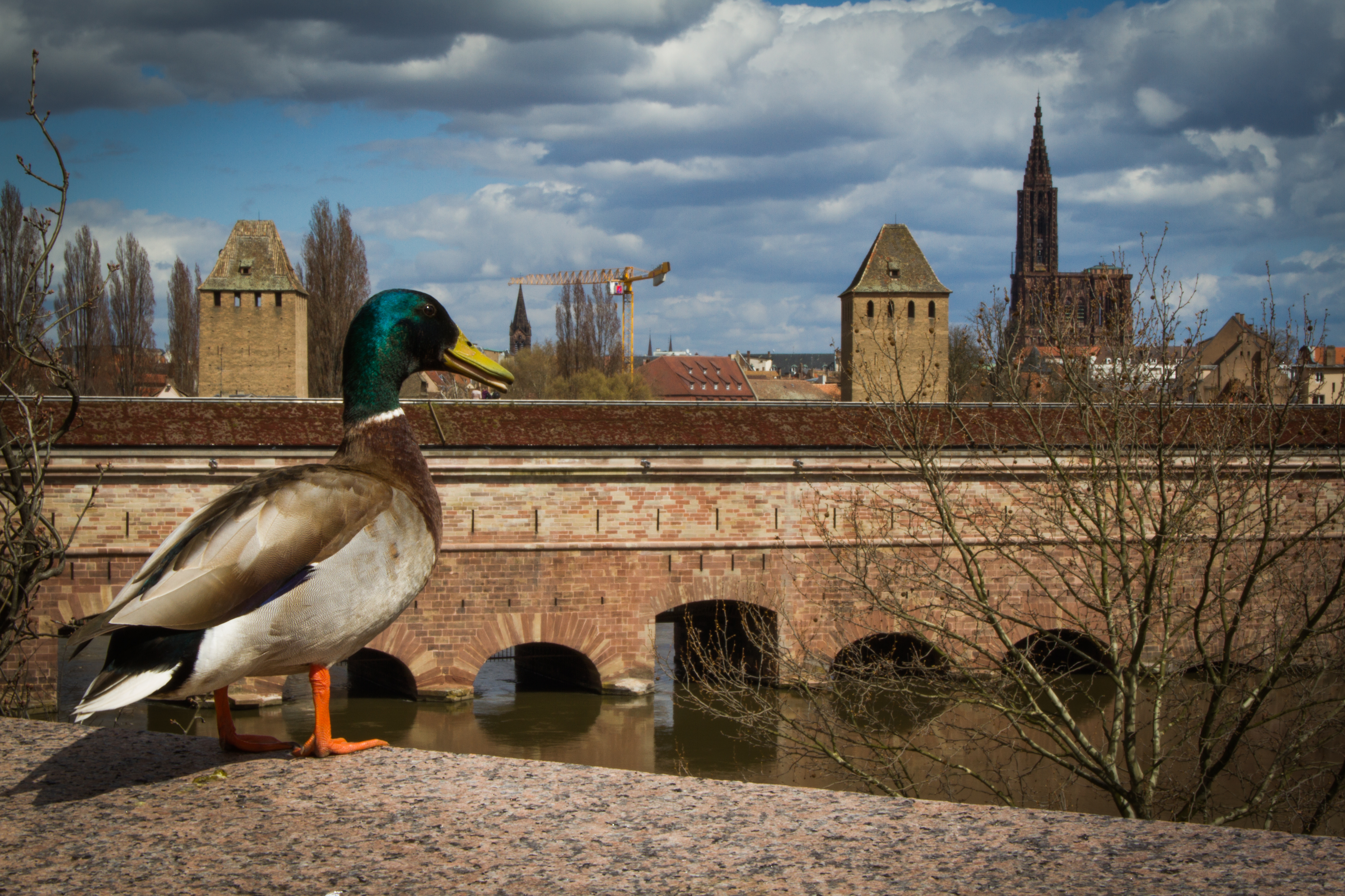 Strasbourg barrage Vauban façade ouest .